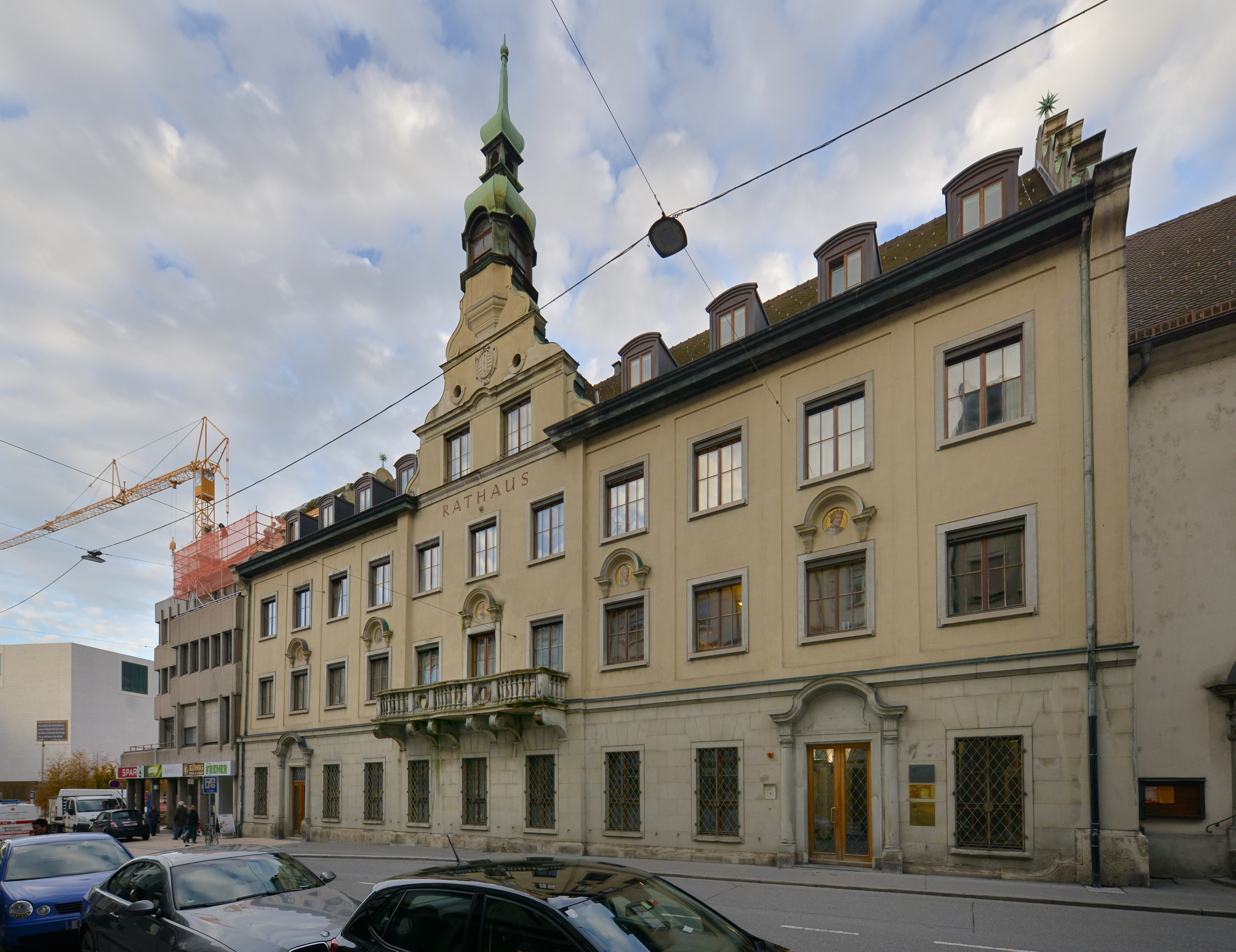 Bregenz , Rathaus, anläßlich des fünfzigjährigen Regierungsjubiläums Kaiser Franz Josefs I. 1898 im Stil der Neorenaissance umgestaltet